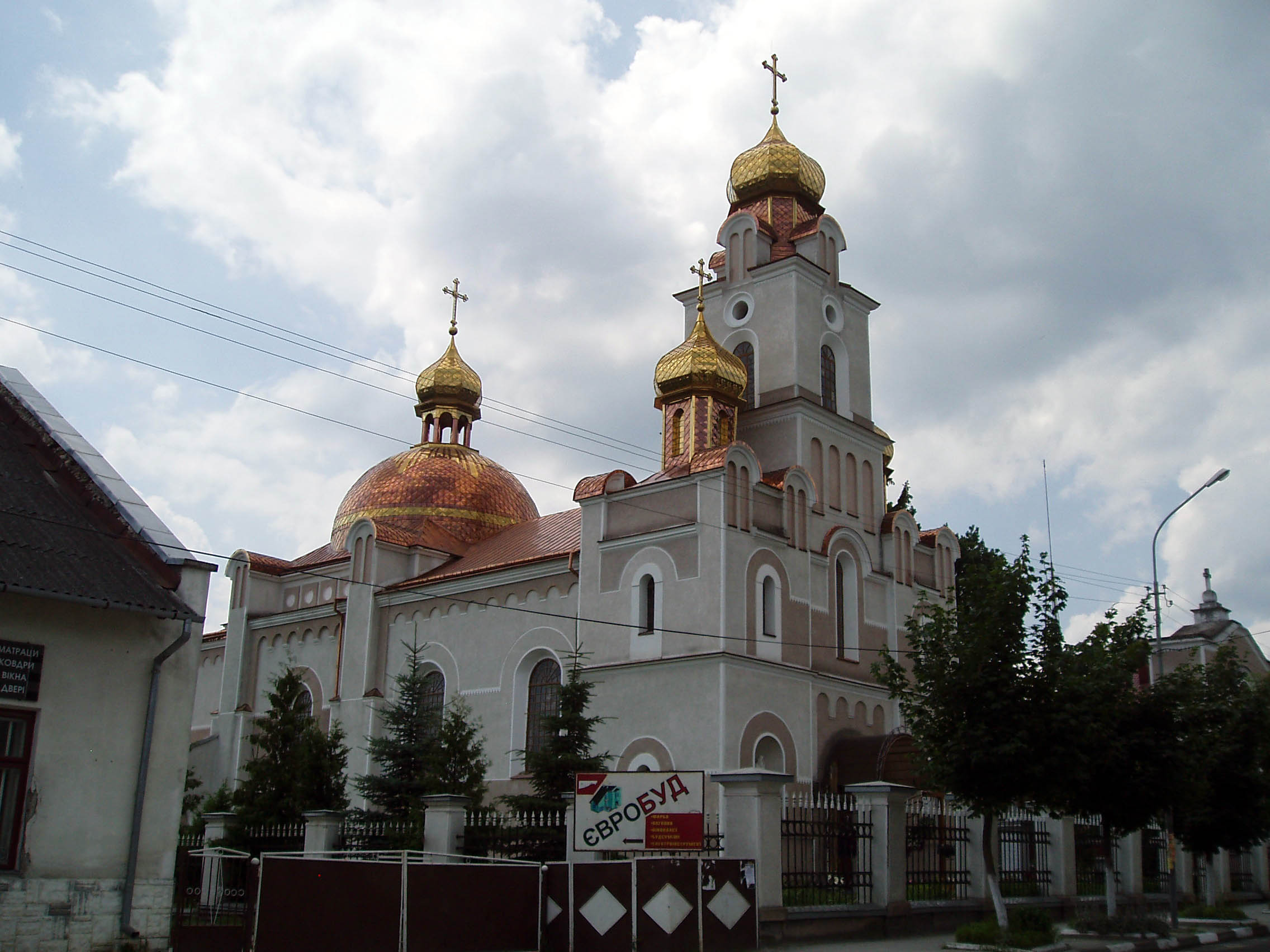 Греко-католицька церква святого Миколая в Миколаєві Львівської області. Збудована у другій половині XIX ст.